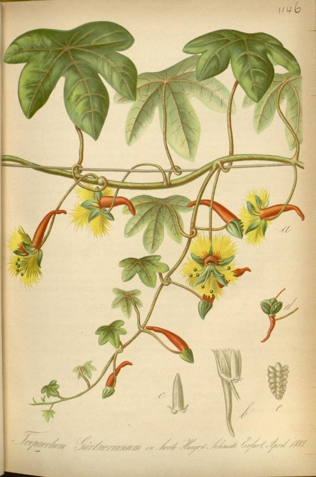 Tropaeolum sanctae-catharinae (as Tropaeolum gaertnerianum)